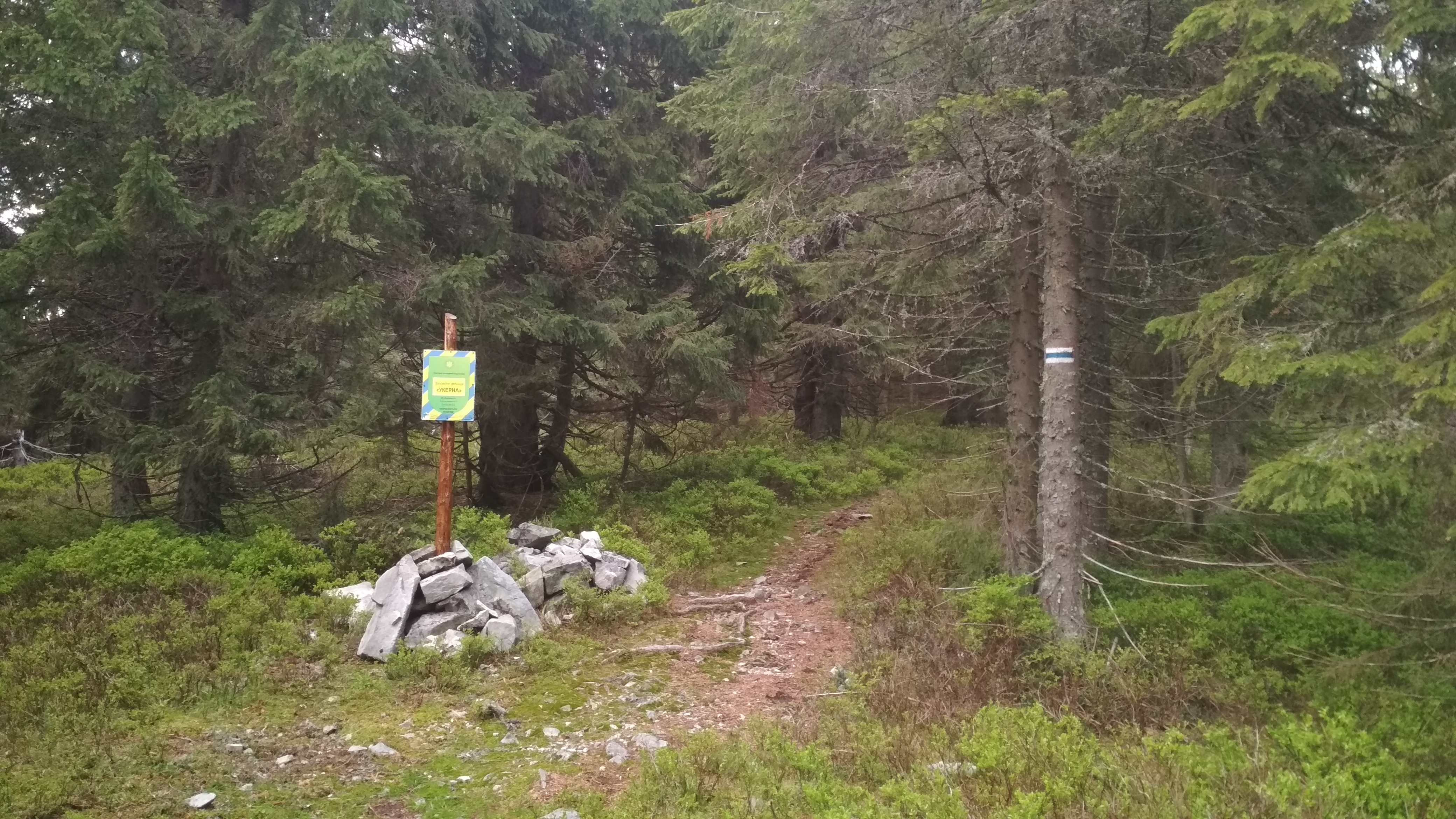 Дерев'яна конструкція замість викраденого шукачами металобрухту в 2014 р.